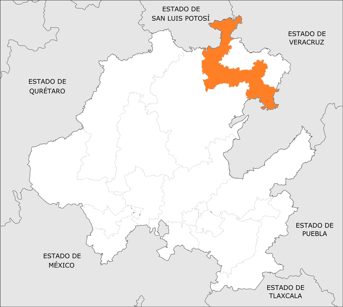 Distrito Electoral Local de Hidalgo 03